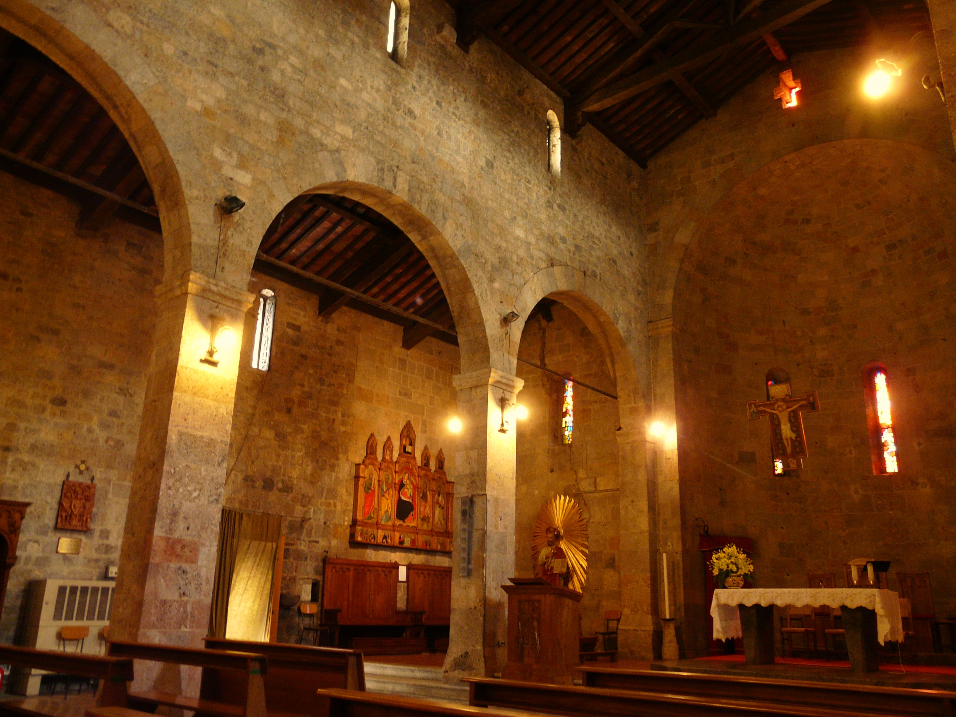 Navata centrale della badia di San Pietro, Camaiore, Toscana, Italia